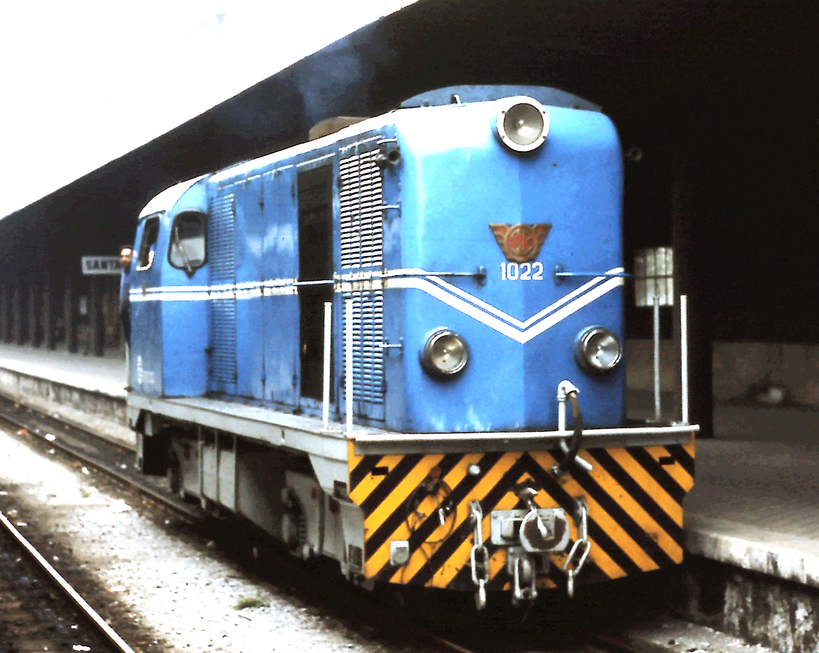 Ferrocarriles de Vía Estrecha (FEVE) locomotief 1022 op 25 september 1977 te Santander.